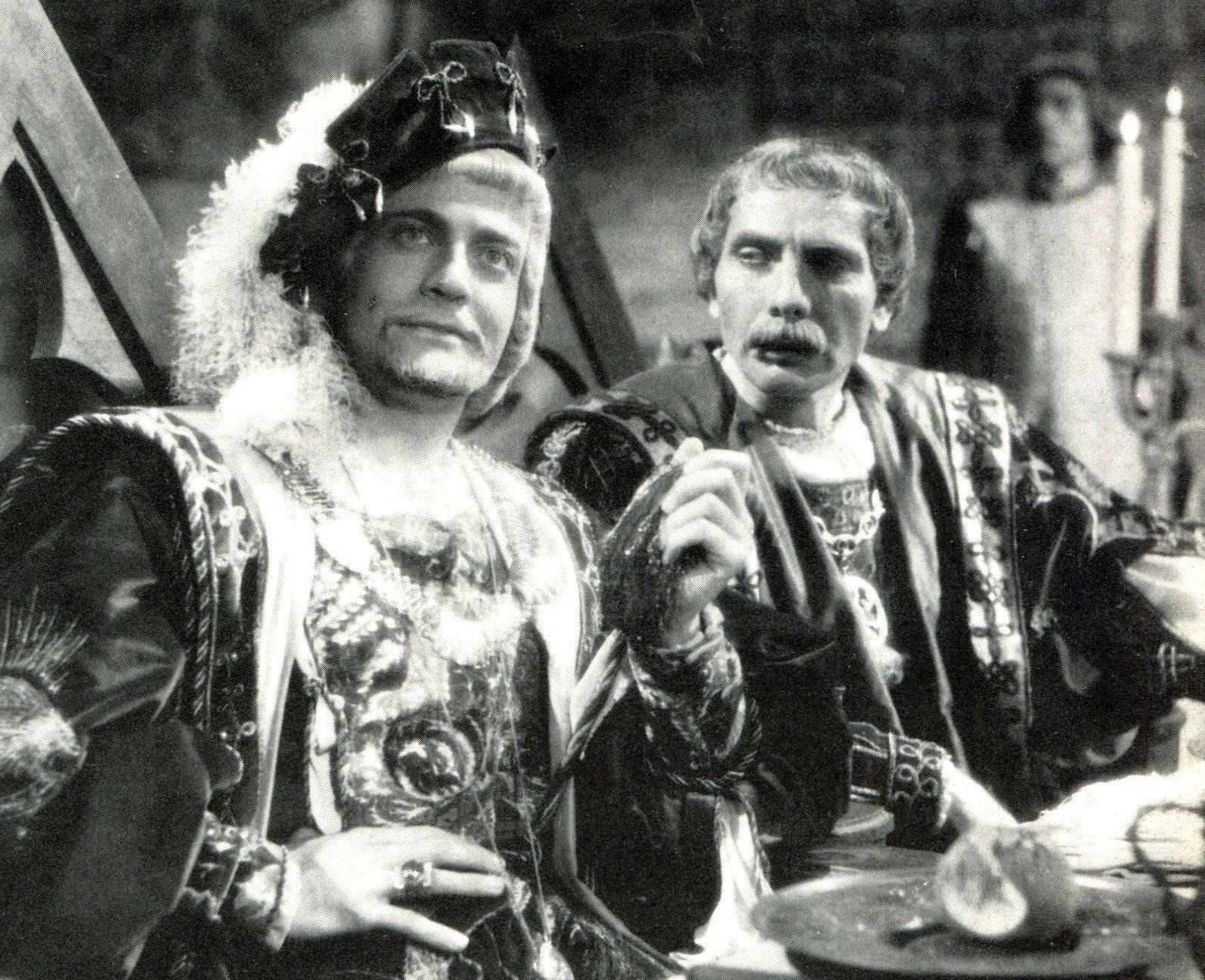 Osvaldo Valenti e Mario Ferrari in "Ettore Fieramosca" (Blasetti, 1938)